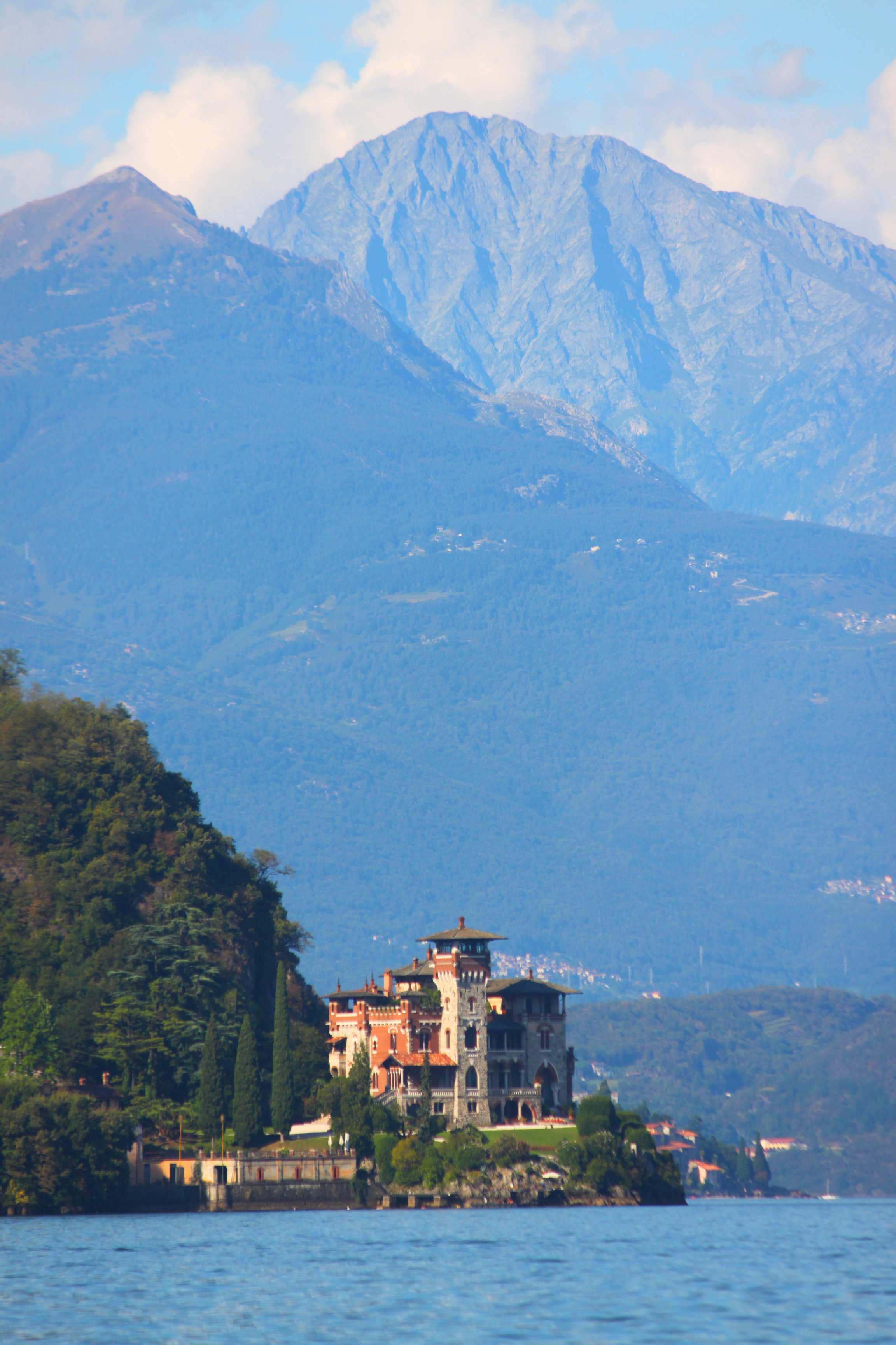 Die Villa La Gaeta in San Siro war 2007 ein Drehort für den James Bond Film Casino Royale